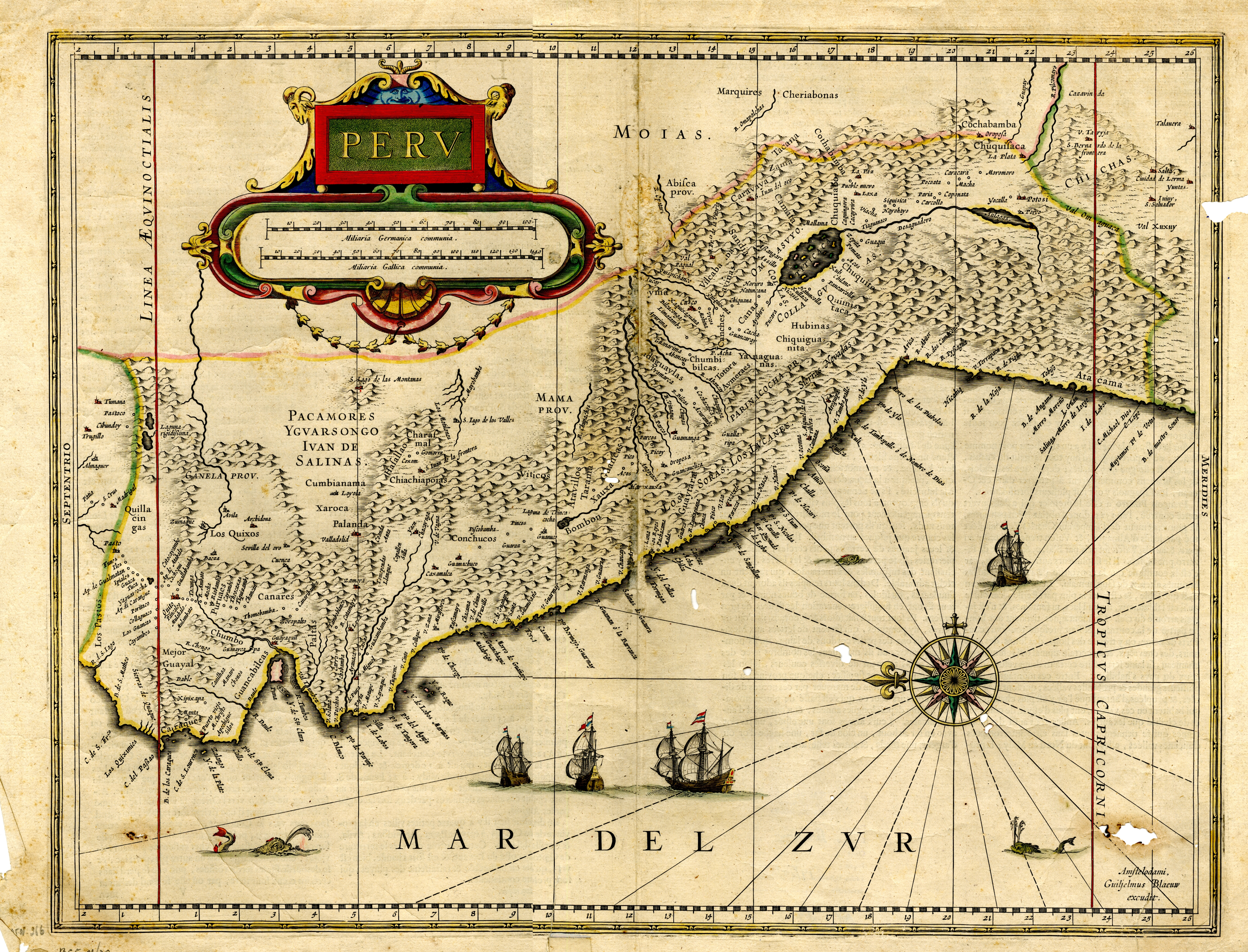 Diapositiva de acceso público consultada del ejemplar original que se custodia en los Fondos Bibliográficos y Cartográfico (Sección: Historia de América Latina) del Archivo Histórico del Guayas - Guayaquil, Ecuador.